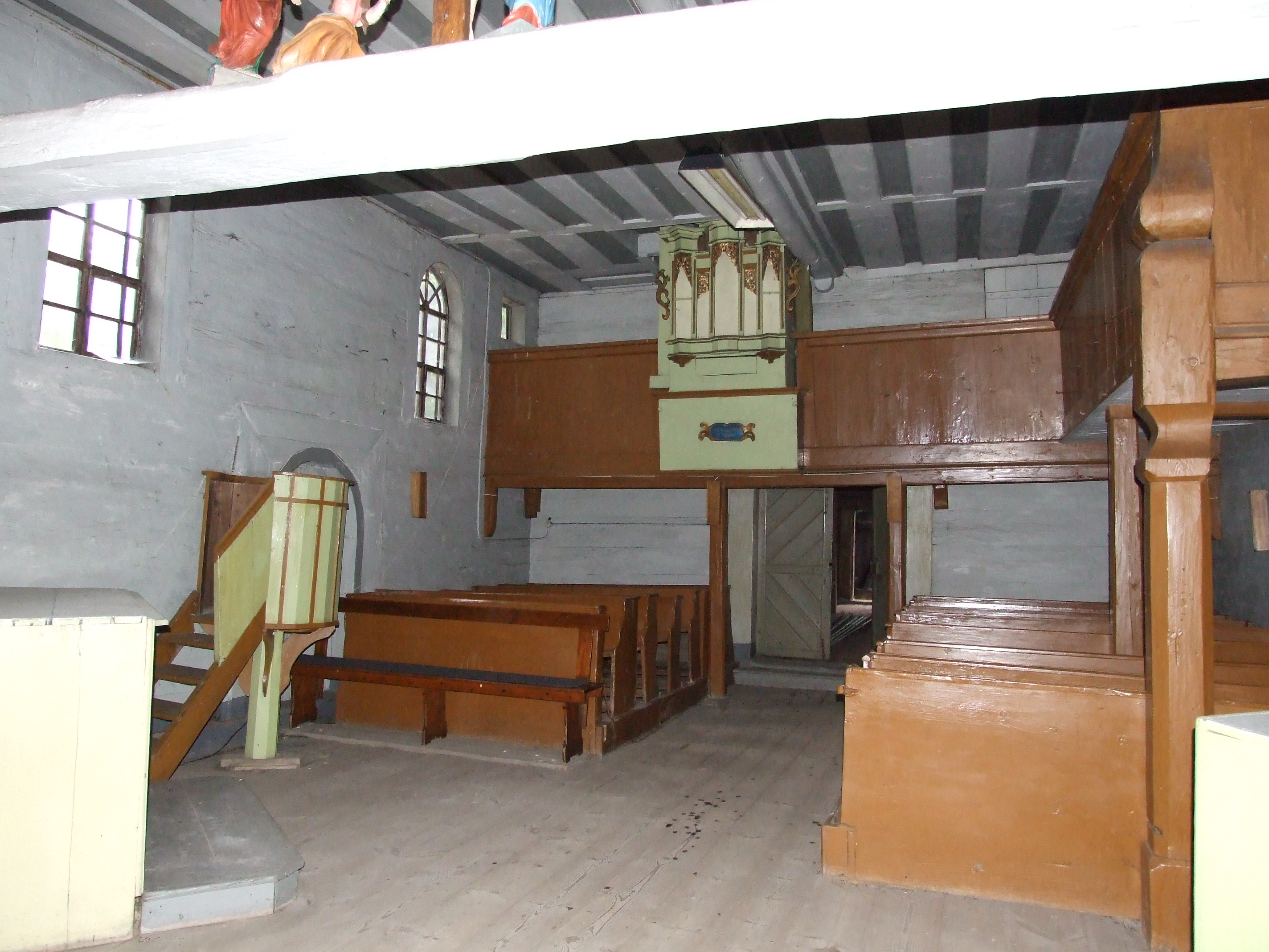 Kościół św. Marcina i Bartłomieja w Borkach Wielkich z 1697r.